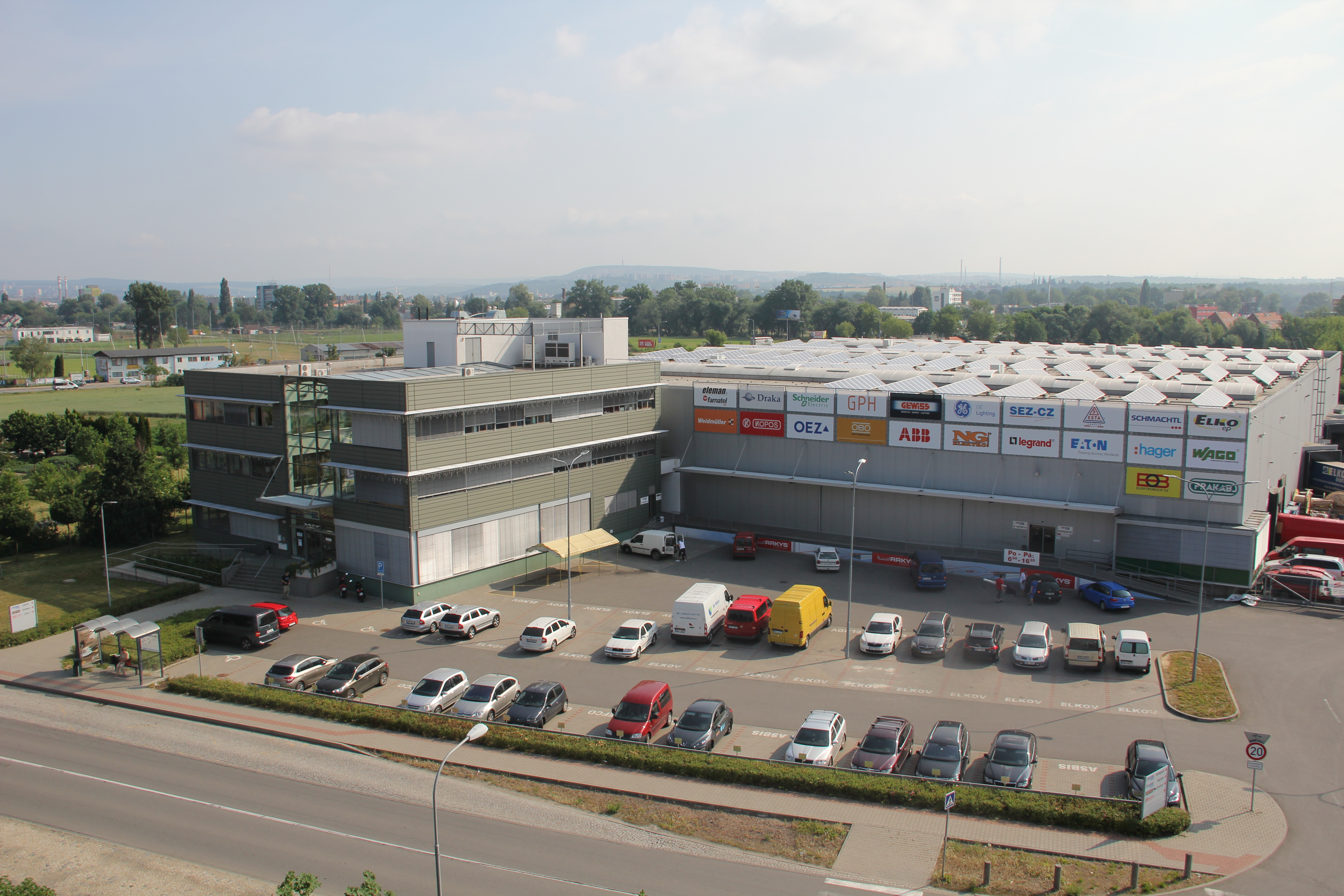 ELKOV elektro, centrála, na ulici Kšírova v Brně.